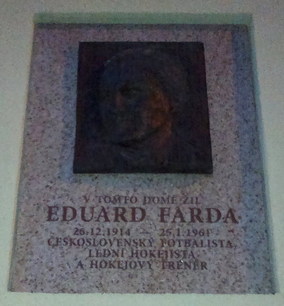 pamětní deska na domě, kde žil Eduard Farda